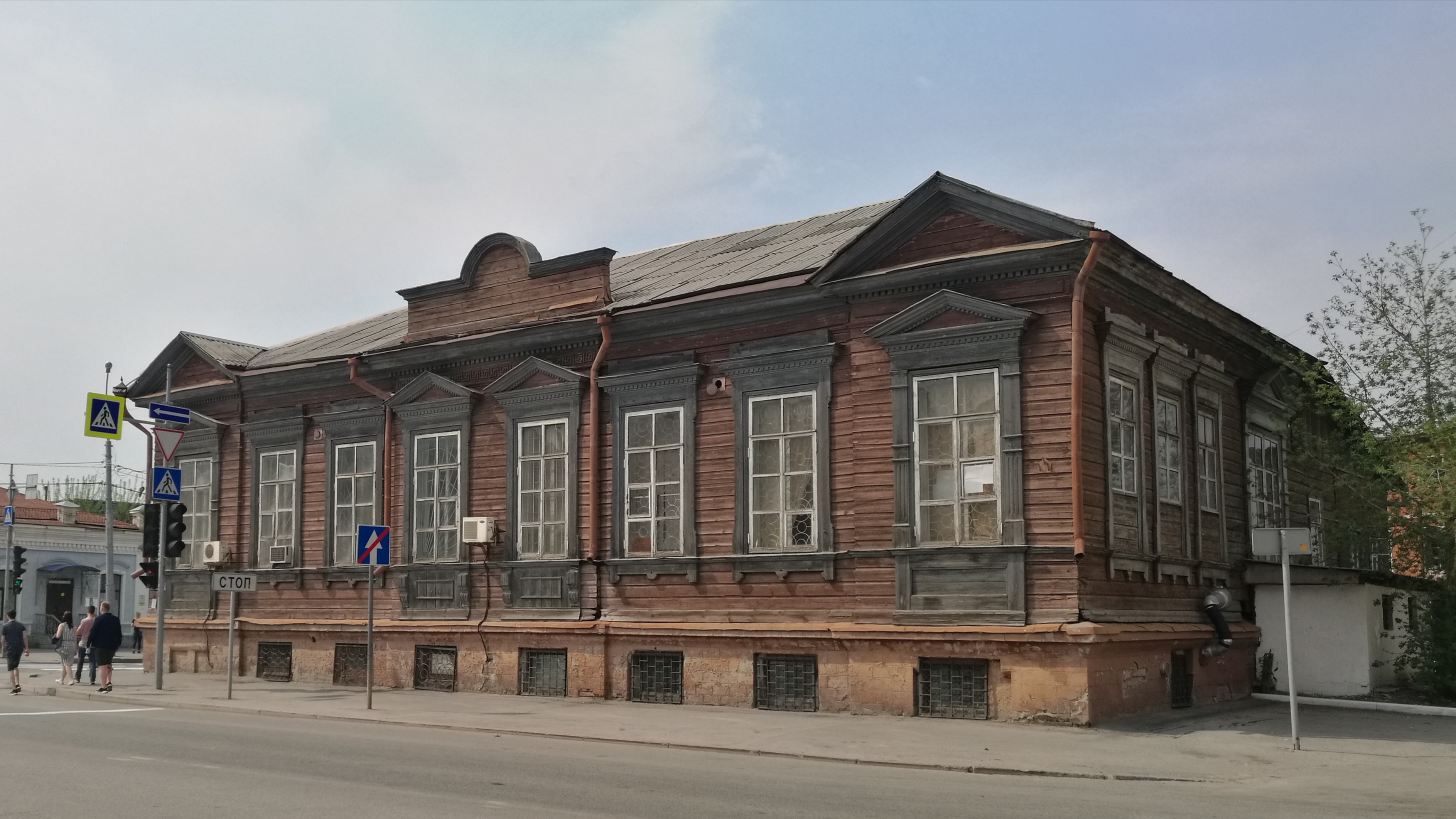 Strato Perekopskaja. Tjumeno, Rusio.